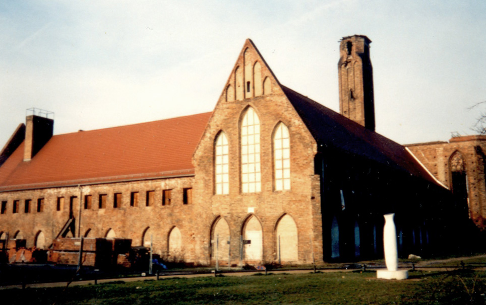 Paulikloster 1995, zu dieser Zeit noch mit Notdach versehen